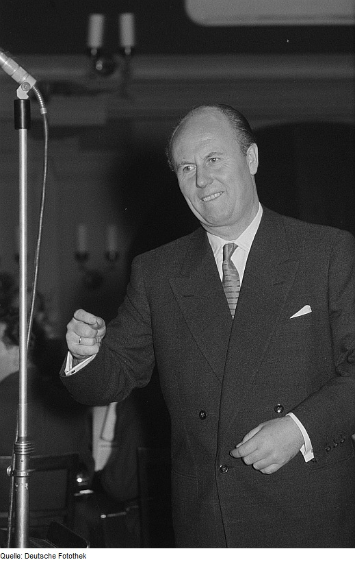 Original image description from the Deutsche Fotothek Kurt Henkels bei der Festivität zum 60jährigen Bestehen der Leipziger Volkszeitung